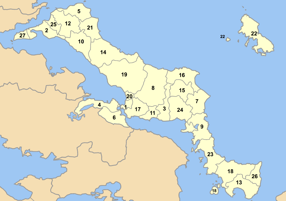 Map of Euboea prefecture (Greece) with administrative divisions (municipalities and communities) numbered in alphabetical order (in greek). Legend: 1. Δήμος Χαλκιδέων - Chalkida 2. Δήμος Αιδηψού - Edipsos 3. Δήμος Αμαρυνθίων - Amarynthos 4. Δήμος Ανθηδώνος - Anthidona 5. Δήμος Αρτεμισίου - Artemisio 6. Δήμος Αυλίδος - Avlida 7. Δήμος Αυλώνος - Avlon 8. Δήμος Διρφύων - Dirfys 9. Δήμος Δυστίων - Dystos 10. Δήμος Ελυμνίων - Elymnii 11. Δήμος Ερέτριας - Eretria 12. Δήμος Ιστιαίας - Istiea 13. Δήμος Καρύστου - Karystos 14. Δήμος Κηρέως - Kireas 15. Δήμος Κονιστρών - Konistres 16. Δήμος Κύμης - Kymi 17. Δήμος Ληλαντίων - Lilandia 18. Δήμος Μαρμαρίου - Marmari 19. Δήμος Μεσσαπίων - Messapia 20. Δήμος Νέας Αρτάκης - Nea Artaki 21. Δήμος Νηλέως - Nileas 22. Δήμος Σκύρου - Skyros 23. Δήμος Στυραίων - Styra 24. Δήμος Ταμιναίων - Taminei 25. Δήμος Ωρεών - Orei 26. Κοινότητα Καφηρέως - Kafireas 27. Κοινότητα Λιχάδος - Lichada